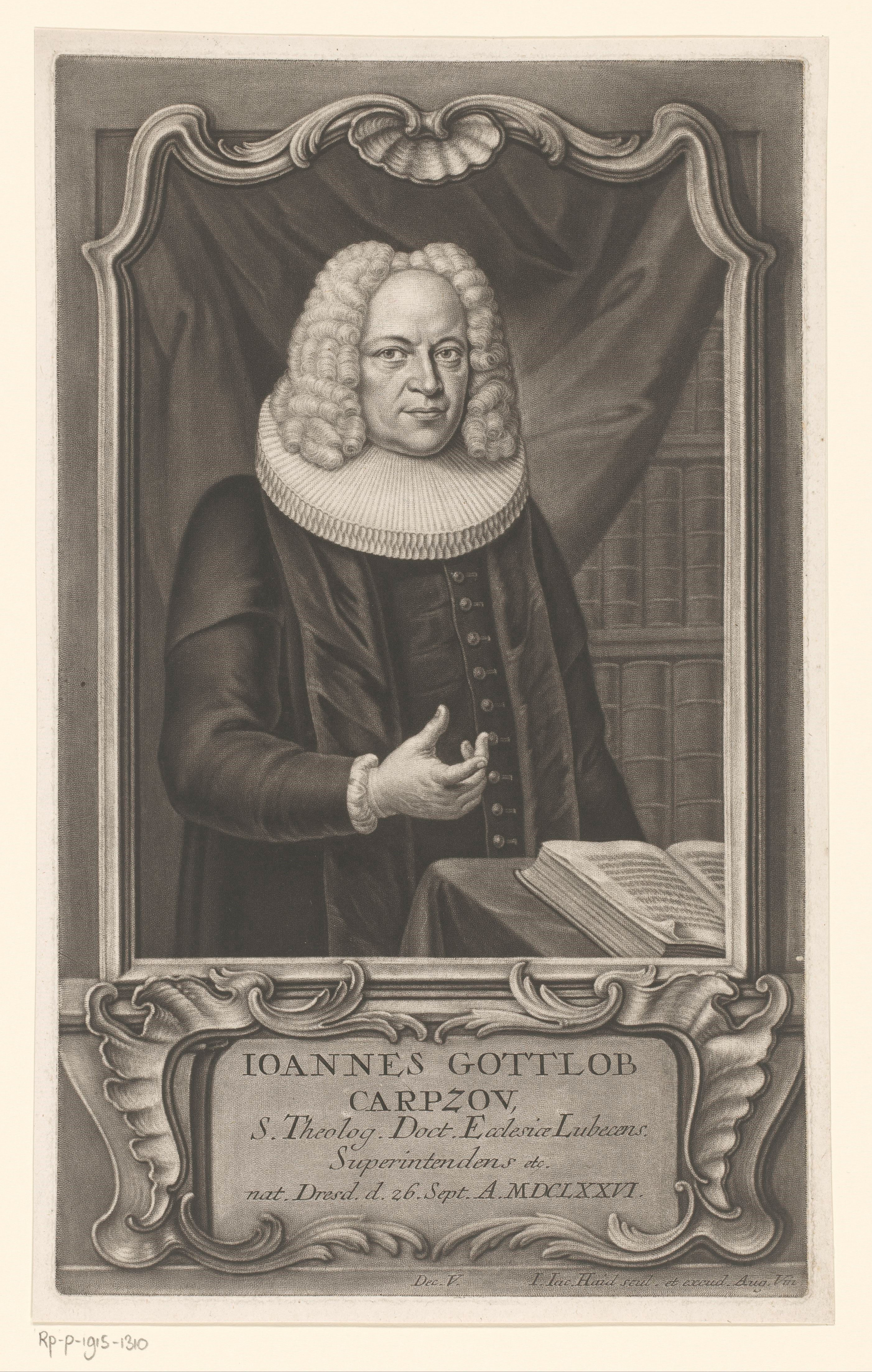 IdentificatieTitel(s): Portret van Johann Gottlob CarpzovObjecttype: prent Objectnummer: RP-P-1915-1310Catalogusreferentie: HAB A 3500Opschriften / Merken: verzamelaarsmerk, verso, gestempeld: Lugt 2228VervaardigingVervaardiger: prentmaker: Johann Jacob Haid (vermeld op object)uitgever: Johann Jacob Haid (vermeld op object)Plaats vervaardiging: AugsburgDatering: 1746Materiaal: papier Techniek: mezzotintAfmetingen: plaatrand: h 316 mm × b 192 mmToelichtingPrent gebruikt voor: Brucker, Jacob. Bildersal heutiges Tages lebender, und durch Gelahrheit berühmter Schrifftsteller. Augsburg: Johann Jacob Haid, 1746.OnderwerpWat: historical personsornament ~ cartouchebookshelvestheologianWie: Johann Gottlob CarpzovVerwerving en rechtenVerwerving: aankoop 1905Copyright: Publiek domein